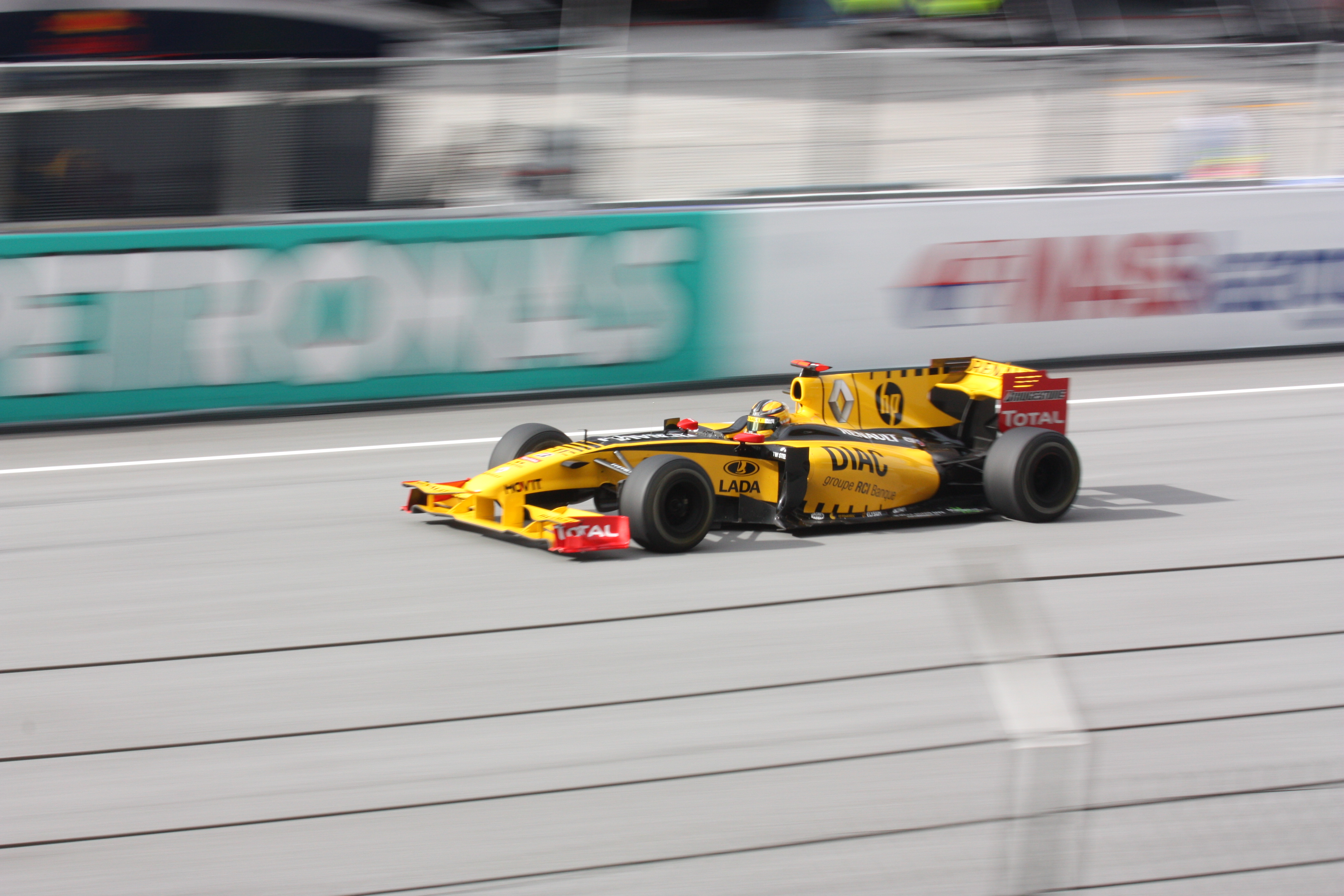 Kubica at malaysia